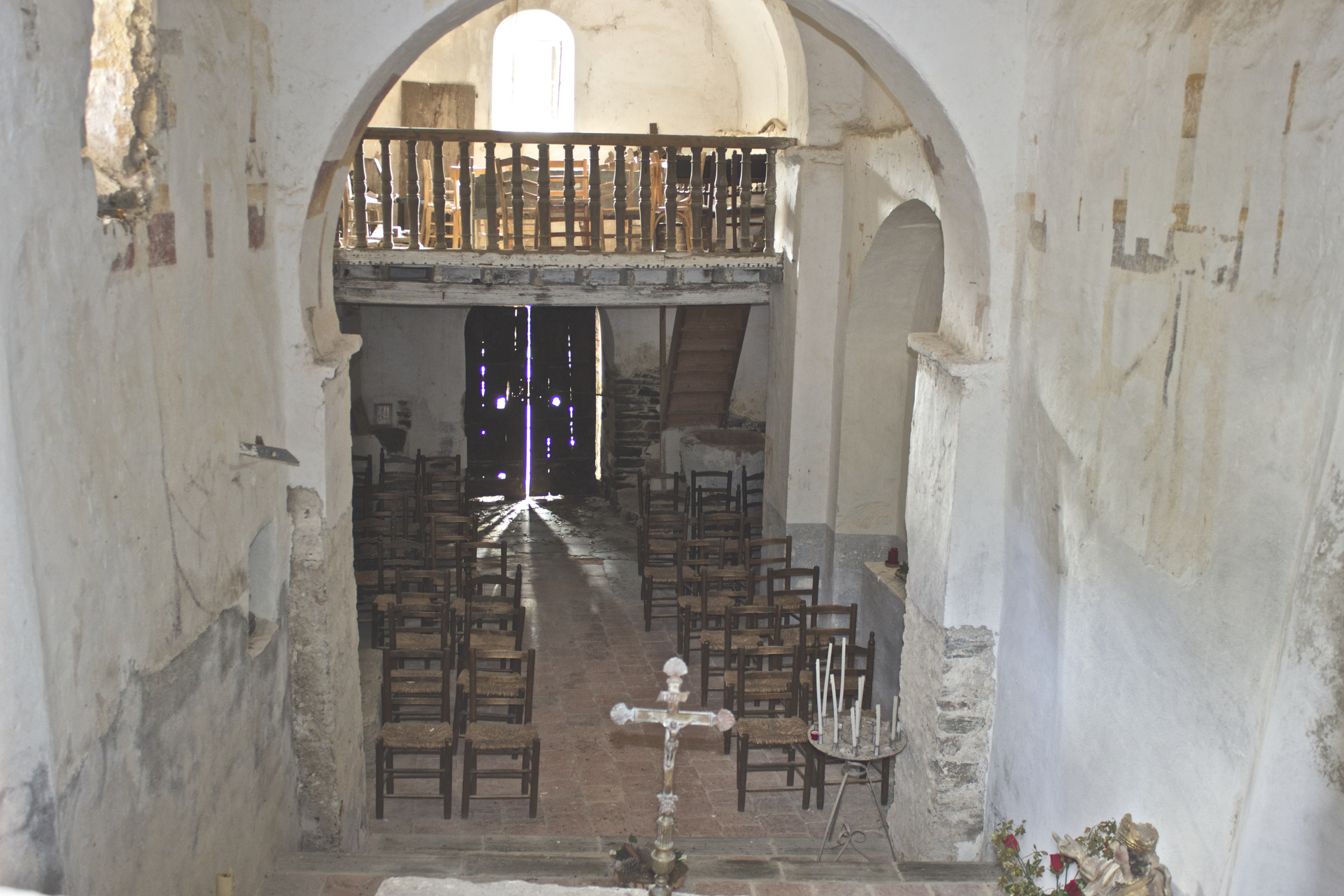 Église Saint-Saturnin de Montauriol